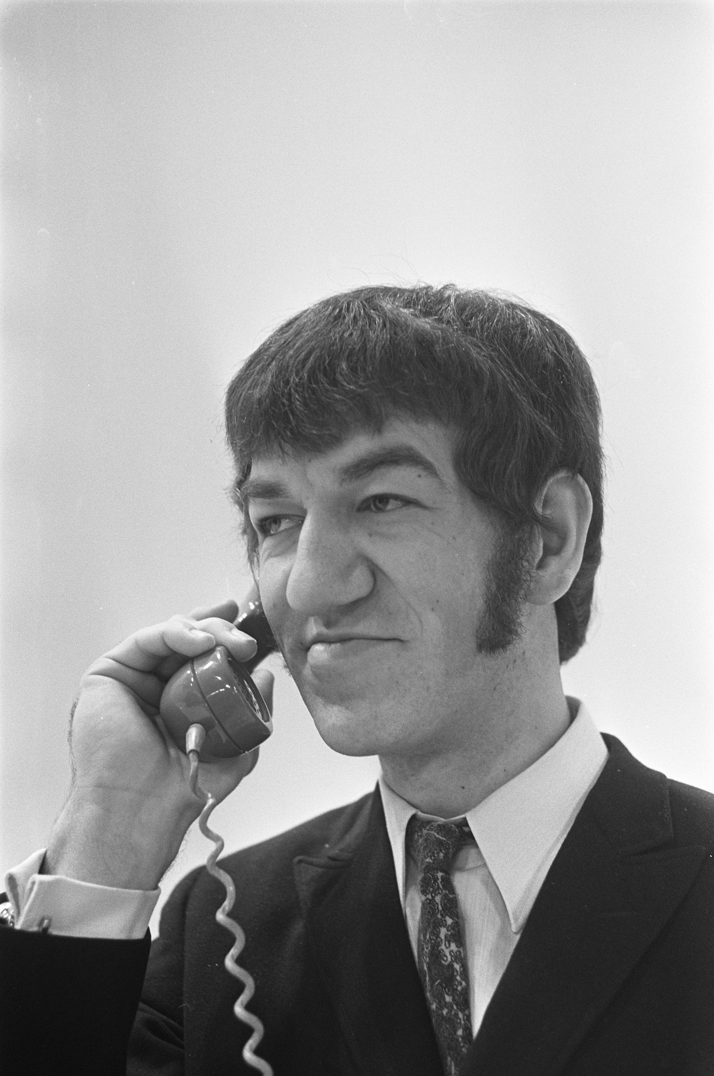 Collectie / Archief : Fotocollectie Anefo Reportage / Serie : [ onbekend ] Beschrijving : TV-programma van Eric Herfst , kop Datum : 4 december 1968 Trefwoorden : TV-programmas Fotograaf : Koch, Eric / Anefo Auteursrechthebbende : Nationaal Archief Materiaalsoort : Negatief (zwart/wit) Nummer archiefinventaris : bekijk toegang 2.24.01.05 Bestanddeelnummer : 921-9125 Reacties Geplaatst door Televisiefan op 29 februari 2016 - 15:40. KRO televisie. Opname voor een mini t.v. spelletje voor in totaal 9 KRO-tv-avonden waarin Eric Herfst telefonerend op het scherm zal verschijnen in 1969. Bron: dagblad Het Vrije Volk d.d. 06-12-1968